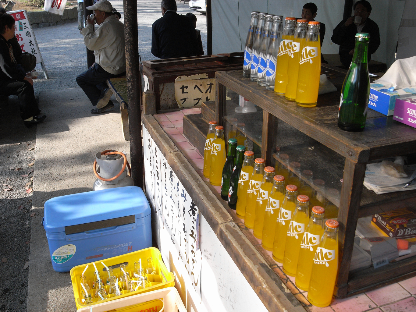 なつかしい感じのジュースが売っていた